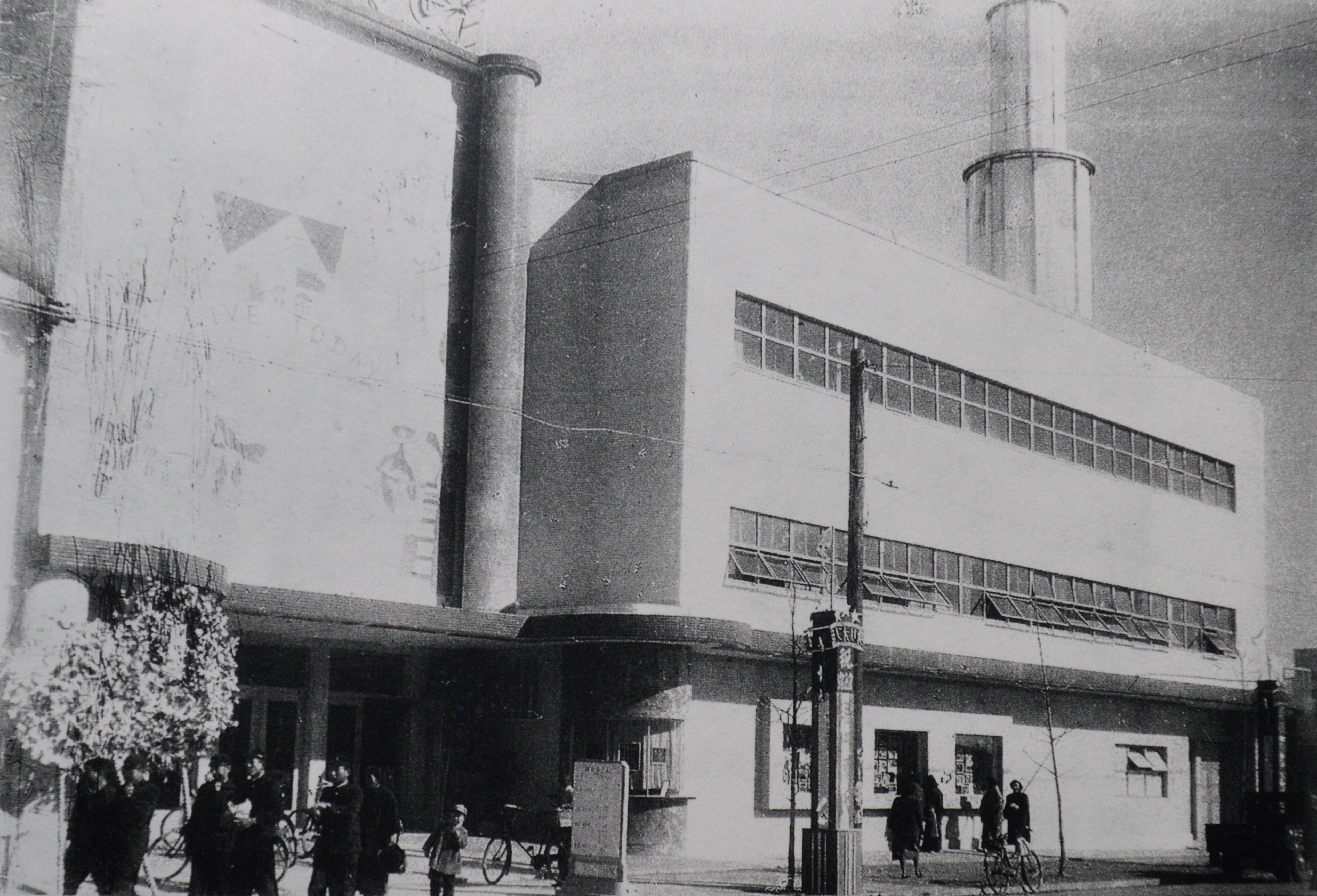 静岡市七間町にあった静岡オリオン座（初代）。